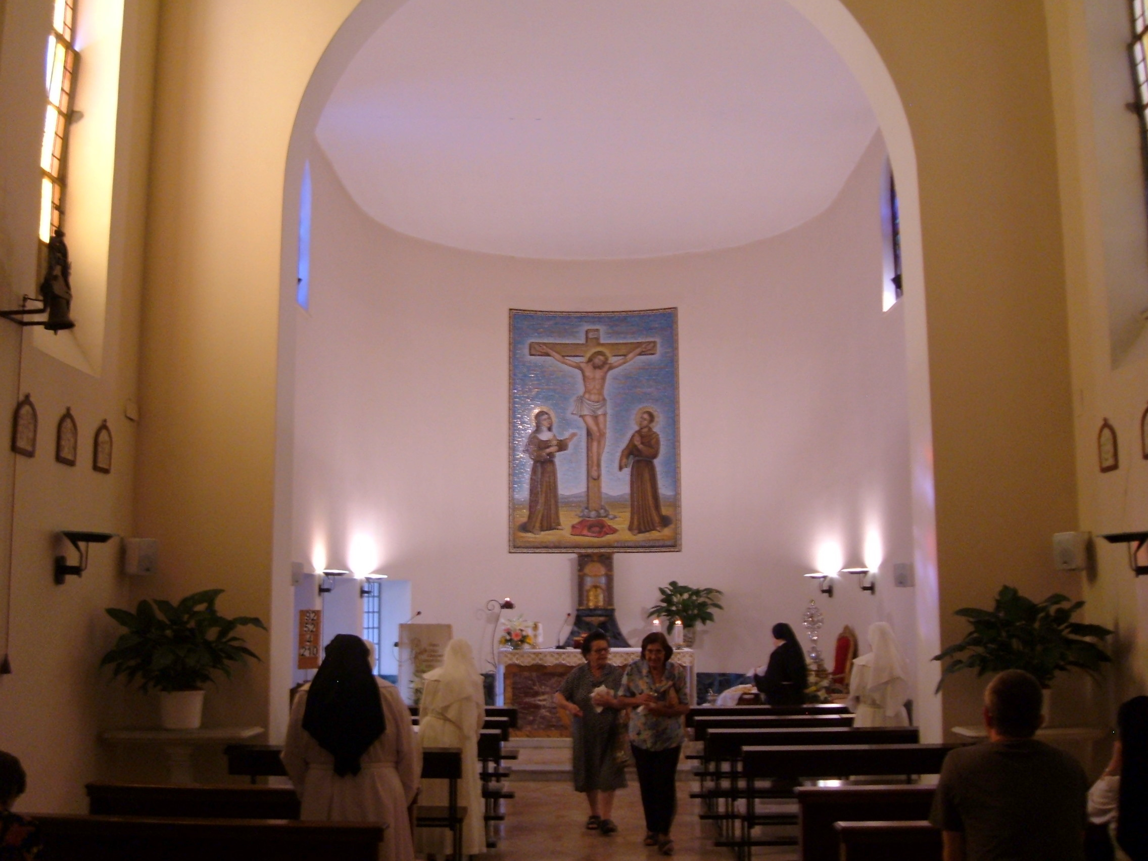 Chiesa del monastero di San Cosimato, a Roma, nel quartiere Ostiense, in via Ambrogio Contarini.